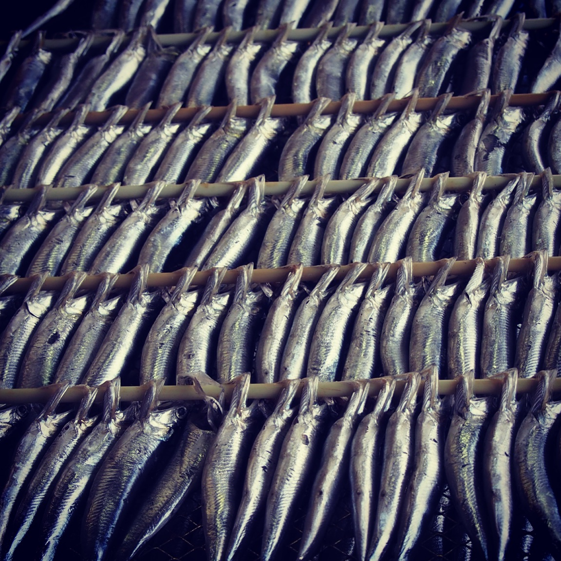 師崎漁港市場師崎漁港市場